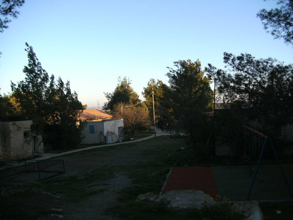 מרכז הר עמשא אחר הצהרים